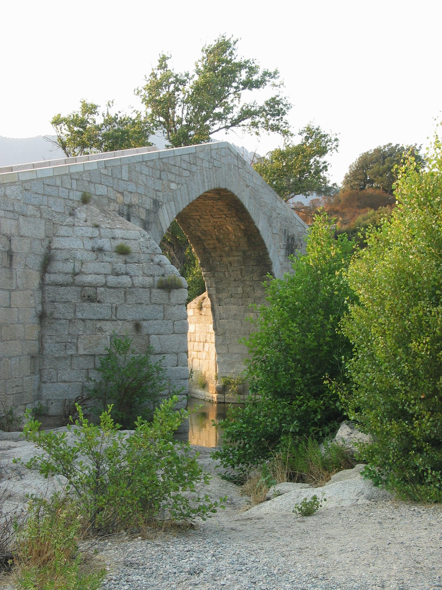 Pont génois du XIIIe siècle en Corse (France) dit Spina Cavallu.